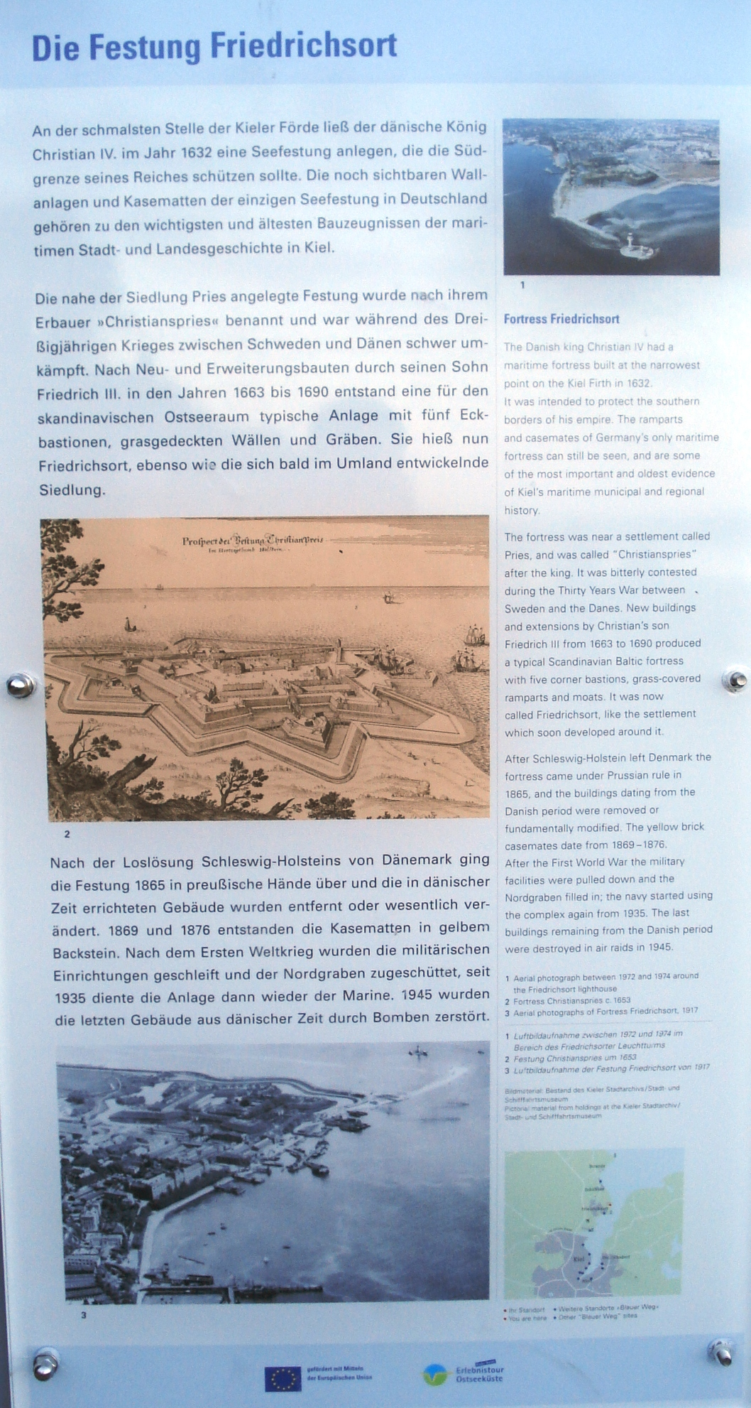 Infostafeld zu Festung Friedrichsort